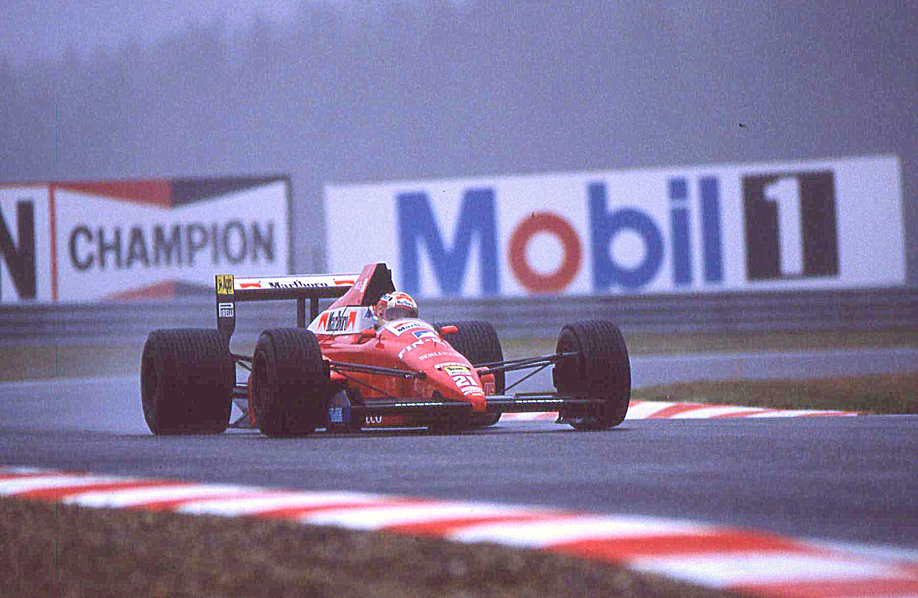 Alex Caffi - BMS Dallara ford ( scan Diapo )